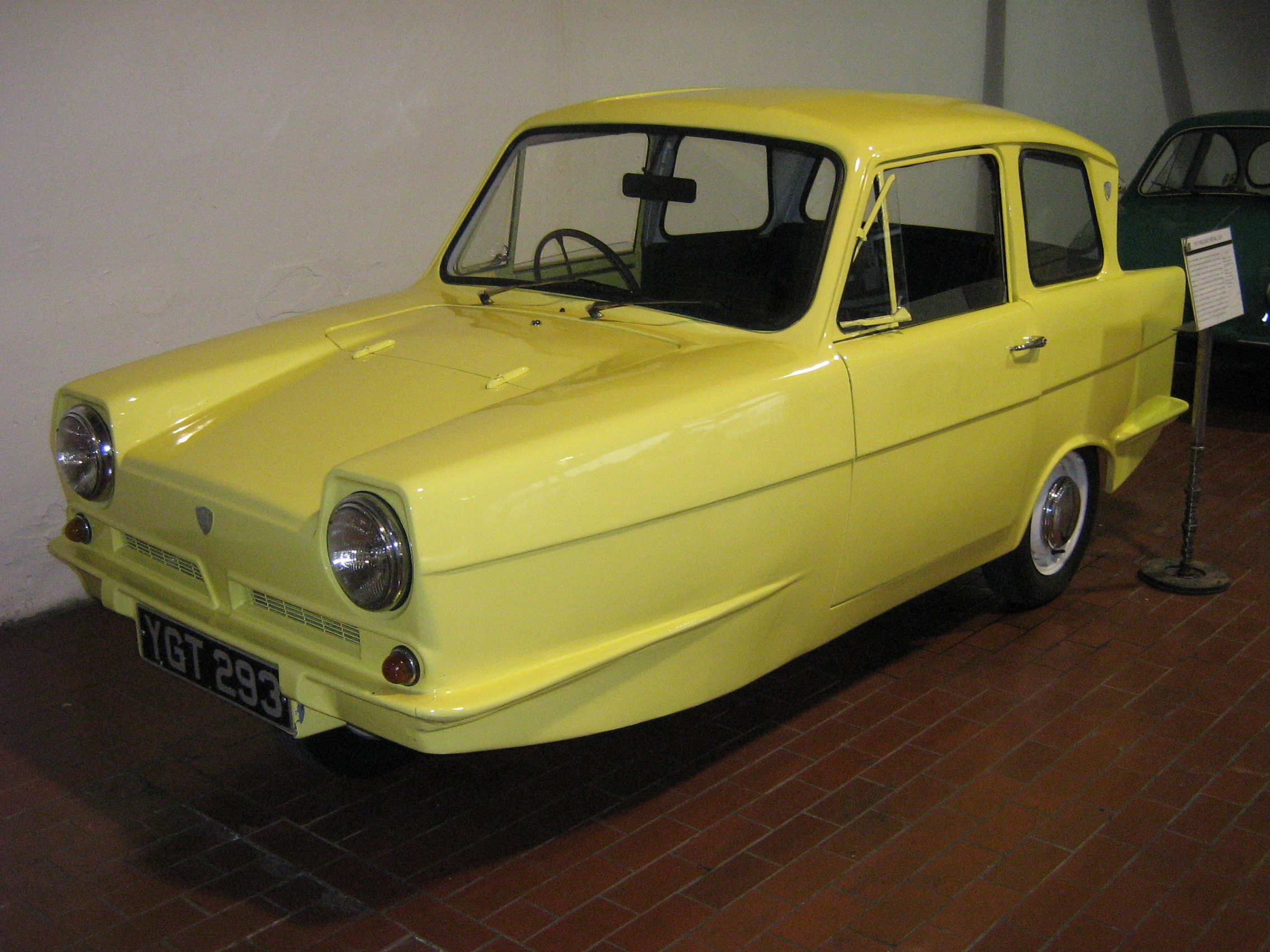 1971 Reliant Regal 3-30